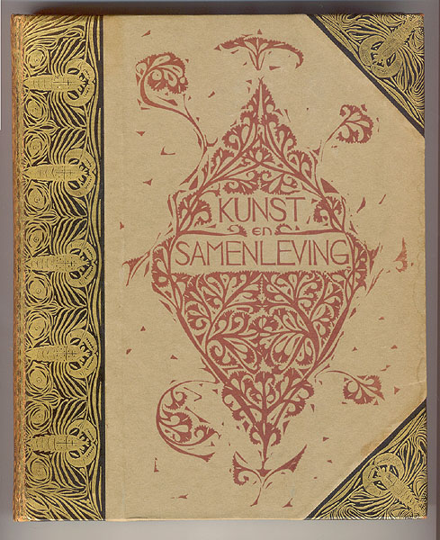 Boekomslag: Kunst en samenleving. 2e druk 1903 (ontwerp: 1893). Auteur: W. Crane. Nederlandse vertaling en bewerking Jan Veth Bandontwerp: G.W. Dijsselhof. Uitgeverij: Scheltema & Holkema